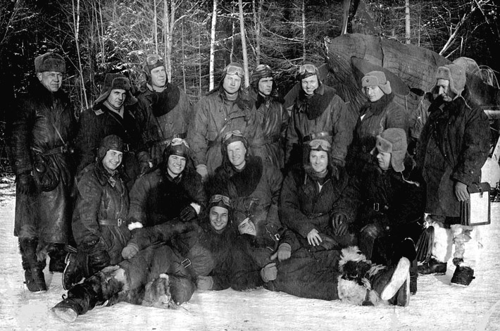 2-я эскадрилья 5-го гвиап 6.12.1941 г. Стоят: ст. батальонный комиссар В.Рулин - комиссар полка, ст. политрук В.Шилкин, ст. лейтенант В.Михайлов, капитан Ф.Мочалов, капитан И.Мещеряков, капитан П.Песков, майор Ю.Беркаль – командир полка, майор Д.Русанов – нач. штаба полка. Сидят: мл. лейтенант Пилонов – адъютант эскадрильи, мл. лейтенант Пименов, капитан Н.Городничев, ст. лейтенант А.Караев, капитан Логвиновский – командир БАО. Лежат: ст. лейтенант И.Лавейкин, ст. лейтенант А.Истомин